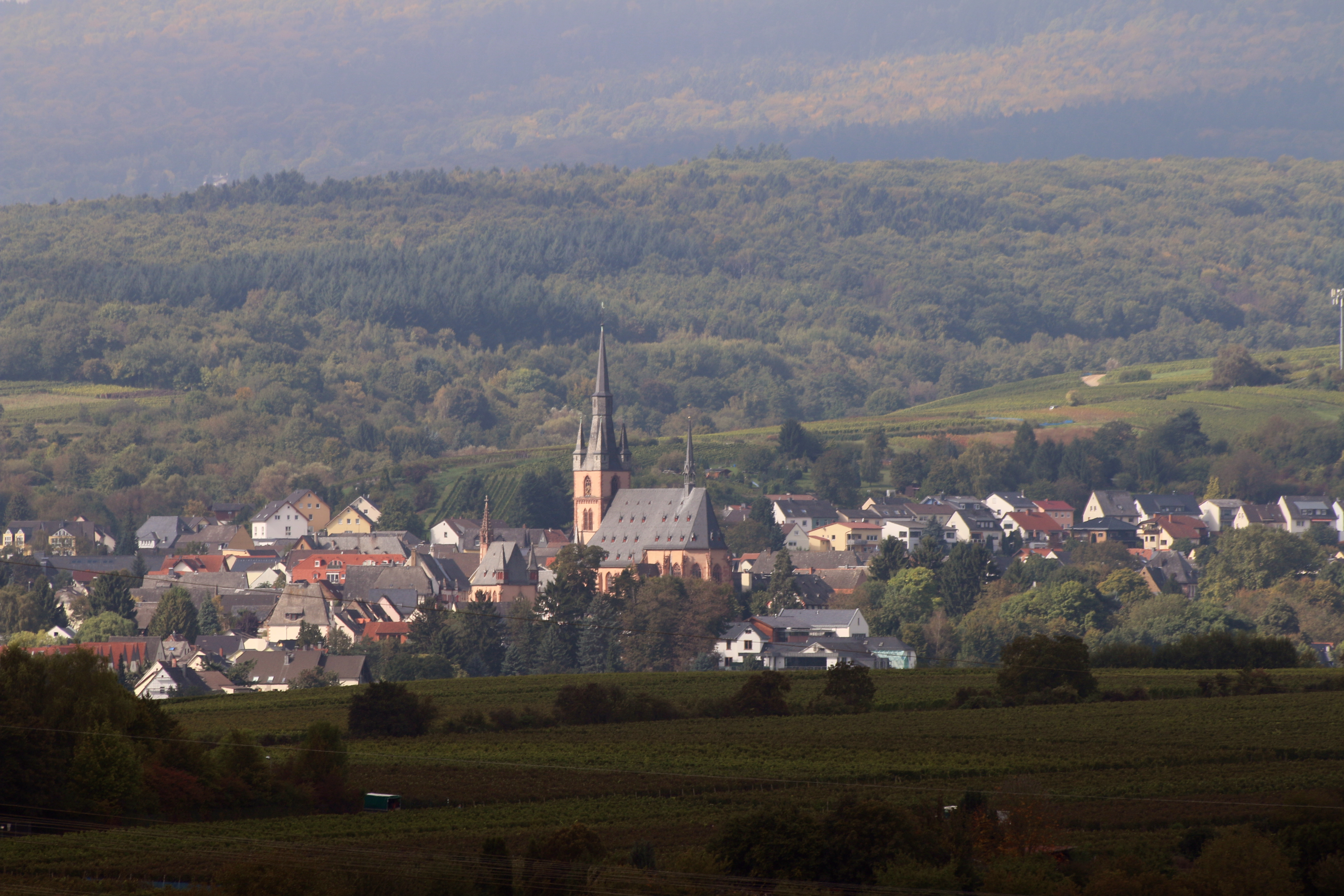 Blick auf Kiedrich, Rheingau, vom Eltviller Sonnenberg aus